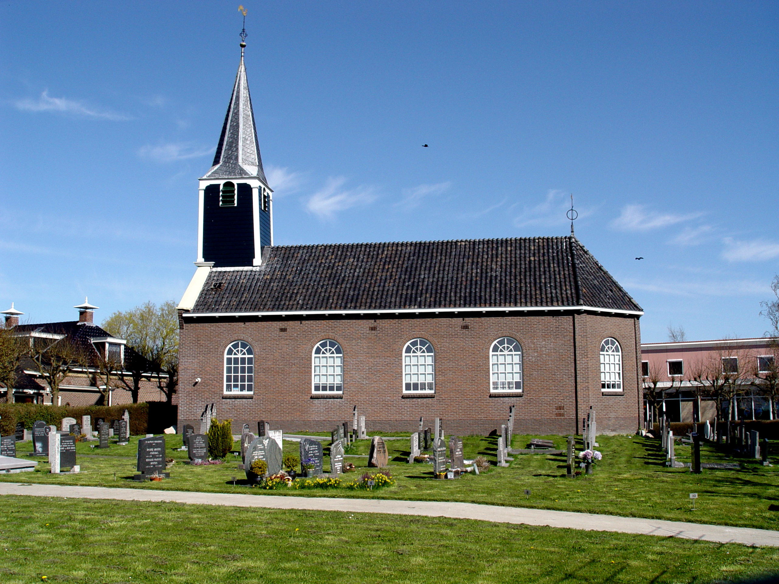 Gaastmeer (Fr) nh kerk uit de 18e eeuw